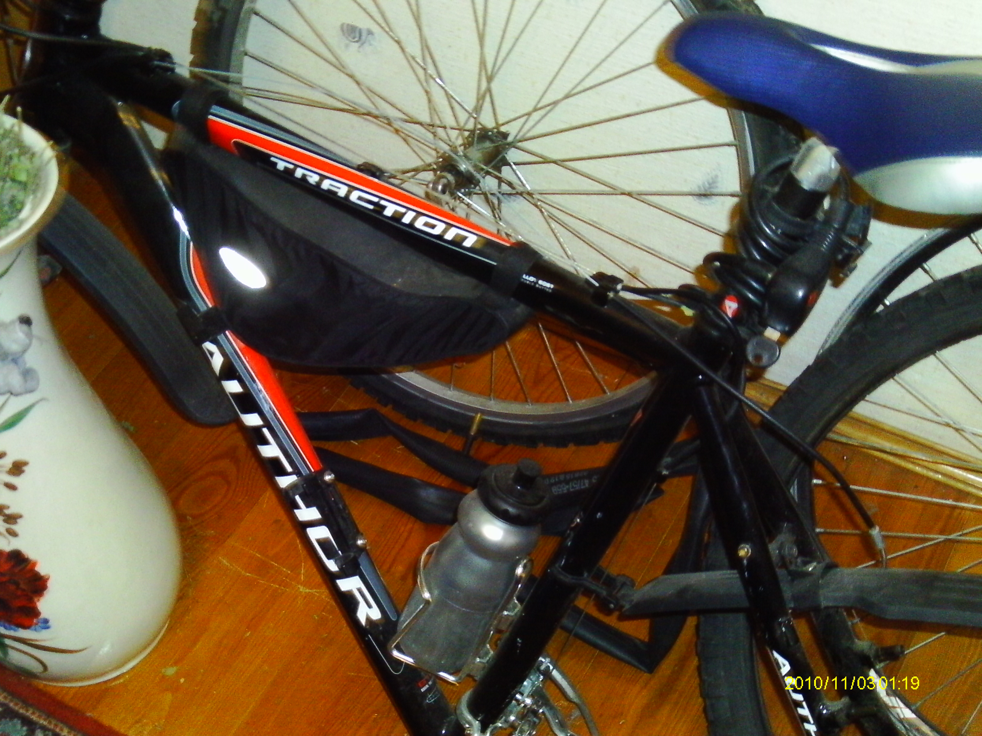 Рама хардтейла Author Traction